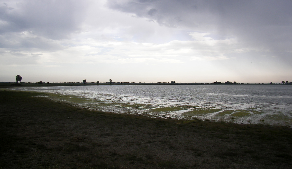 Darscho (Warmsee), eine Salzlacke im Burgenlan, spätnachmittags im Juni 2006